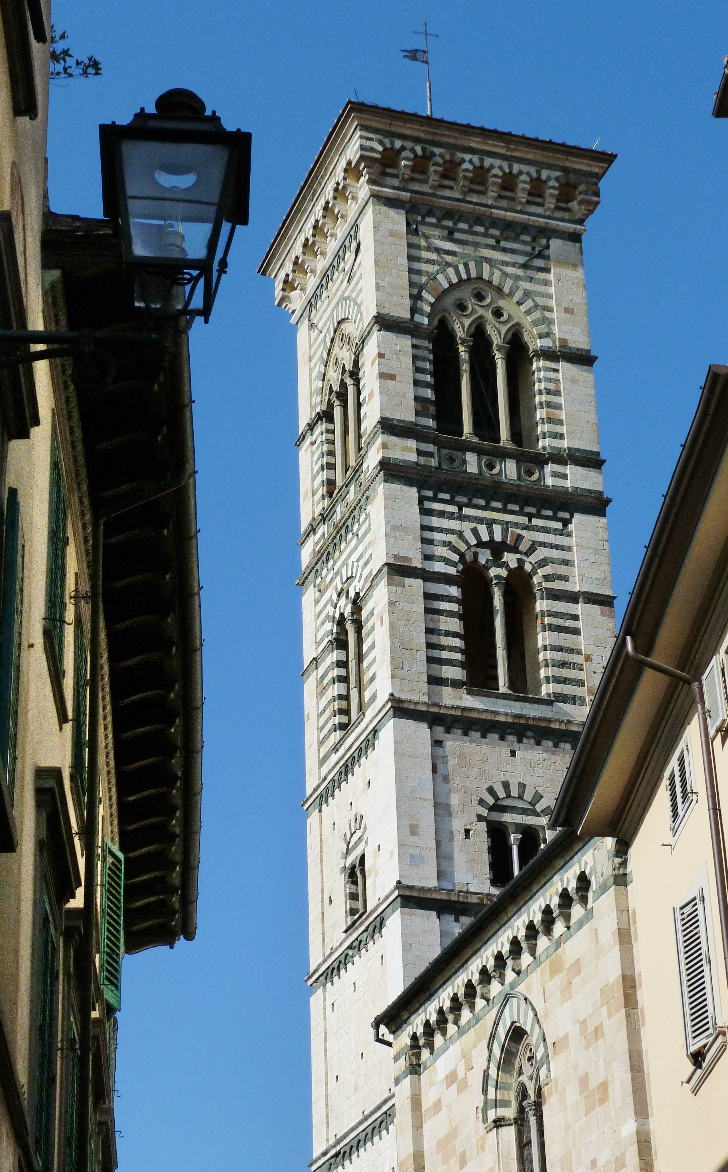 Campanile del Duomo di Prato, Toscana, Italia This is a photo of a monument which is part of cultural heritage of Italy.